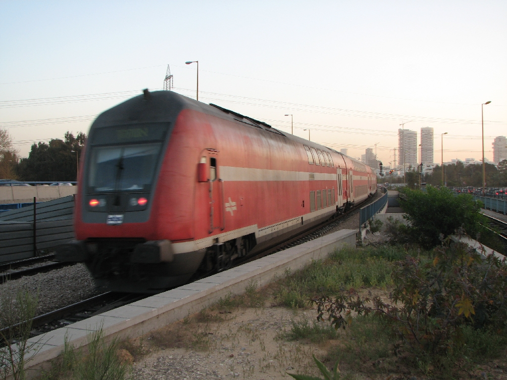 קרון ניהוג משולב עם קרון כוח וקרון נוסעים דו קומתי מתוצרת Bombardier